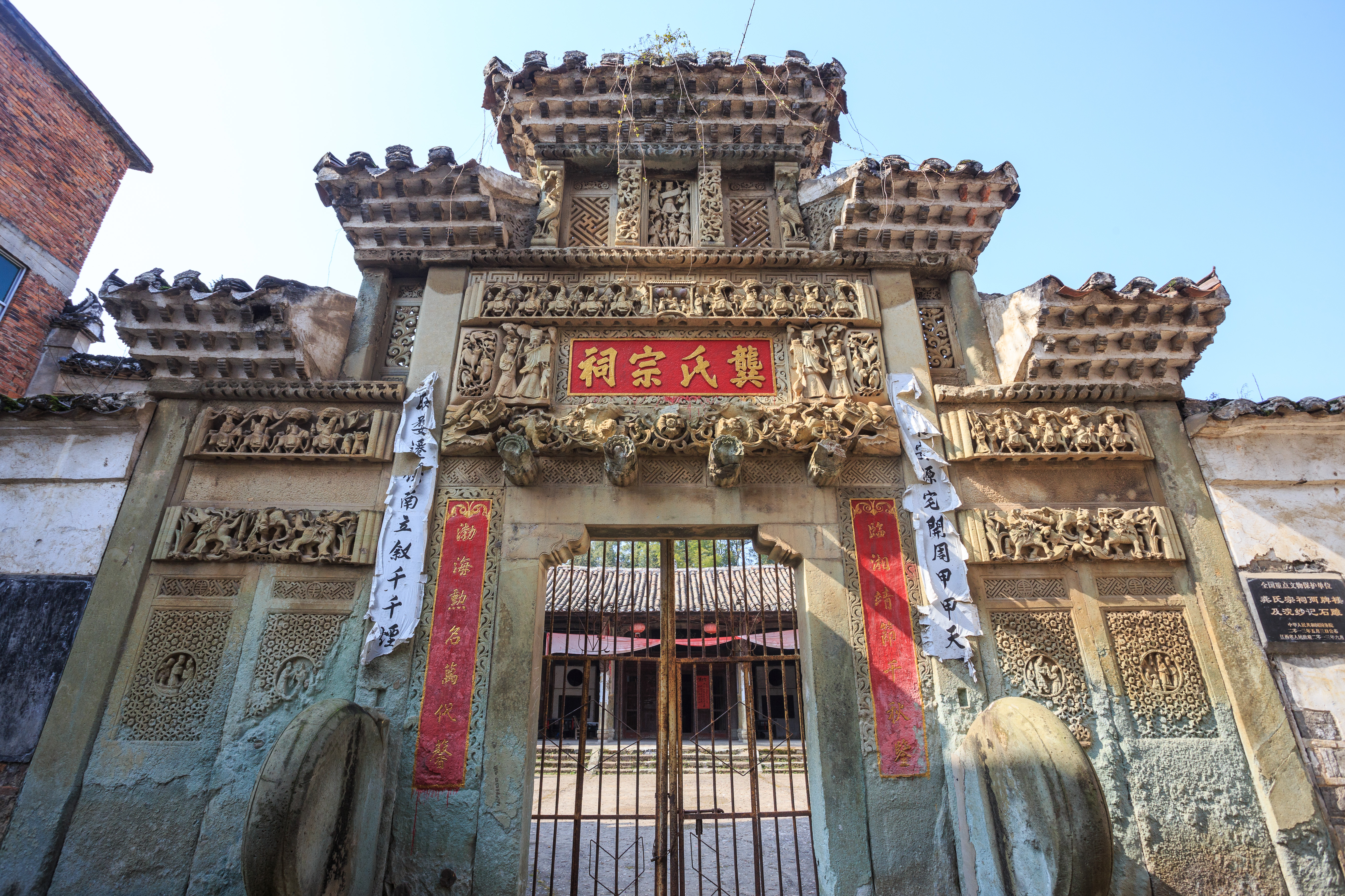 龚氏宗祠——叙千祠